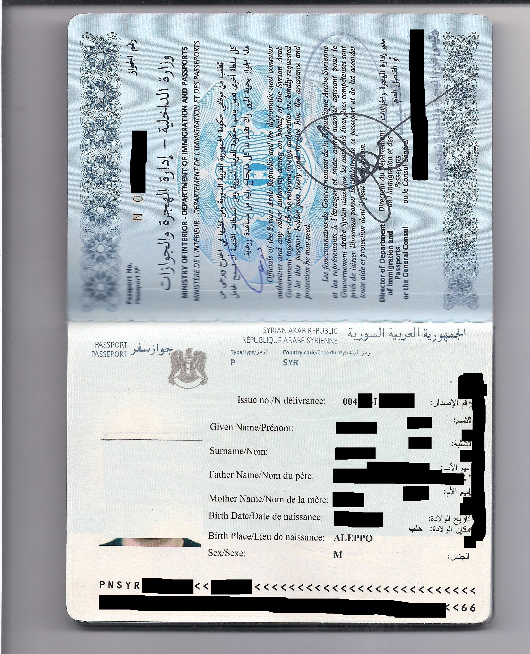 جواز سفر_وثيقة سفر_باسبور